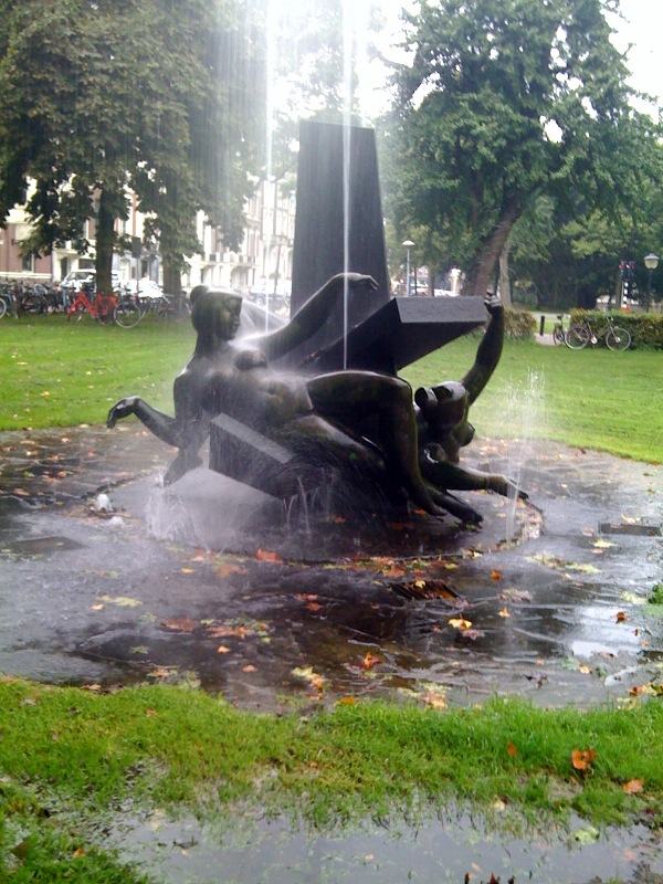 Feest der Muzen, beeldenpartij met fontein voor de Utrechtse Stadsschouwburg aan het Lucasbolwerk